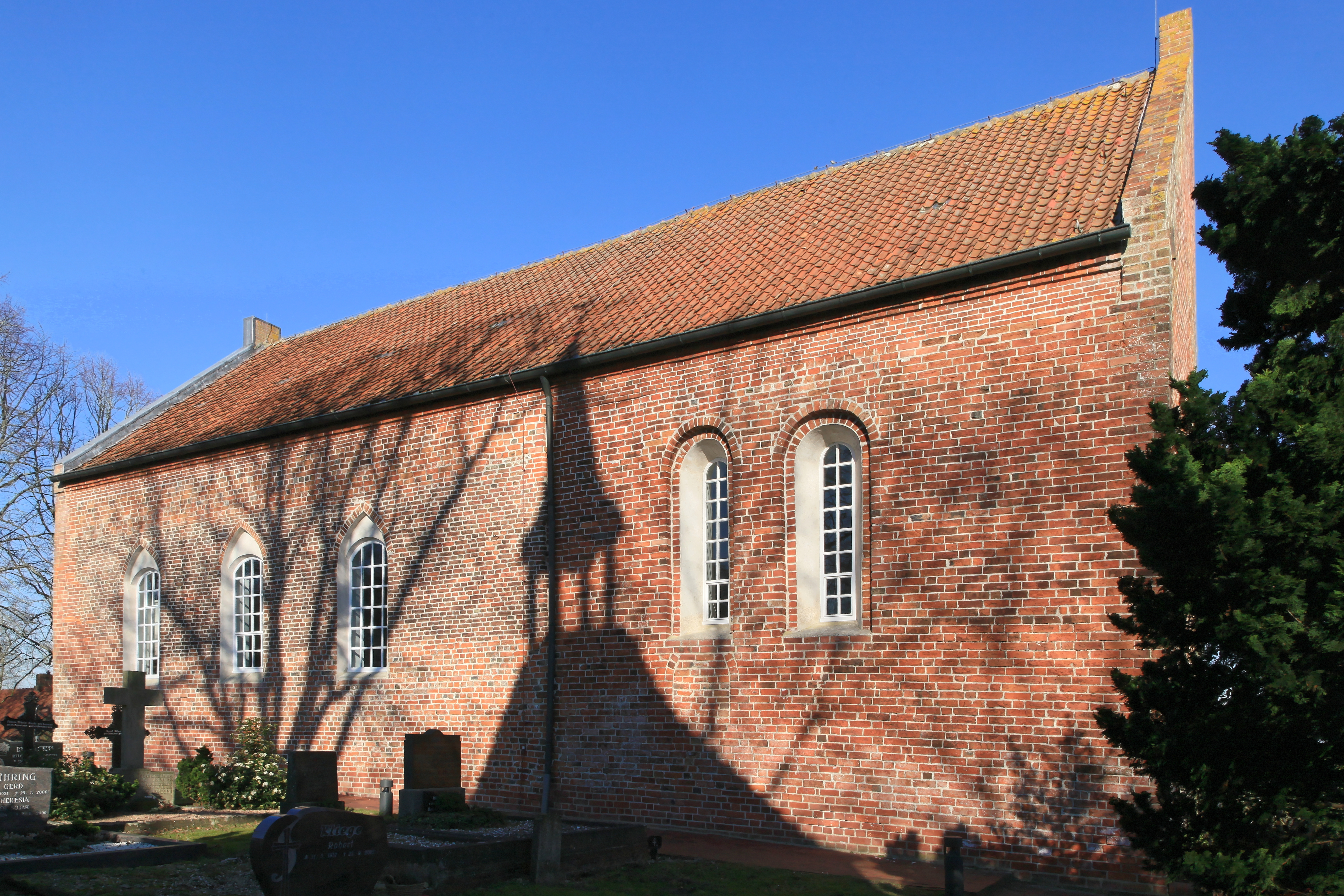 Friedhof und Liudgeri-Kirche in Holtgaste, Jemgum